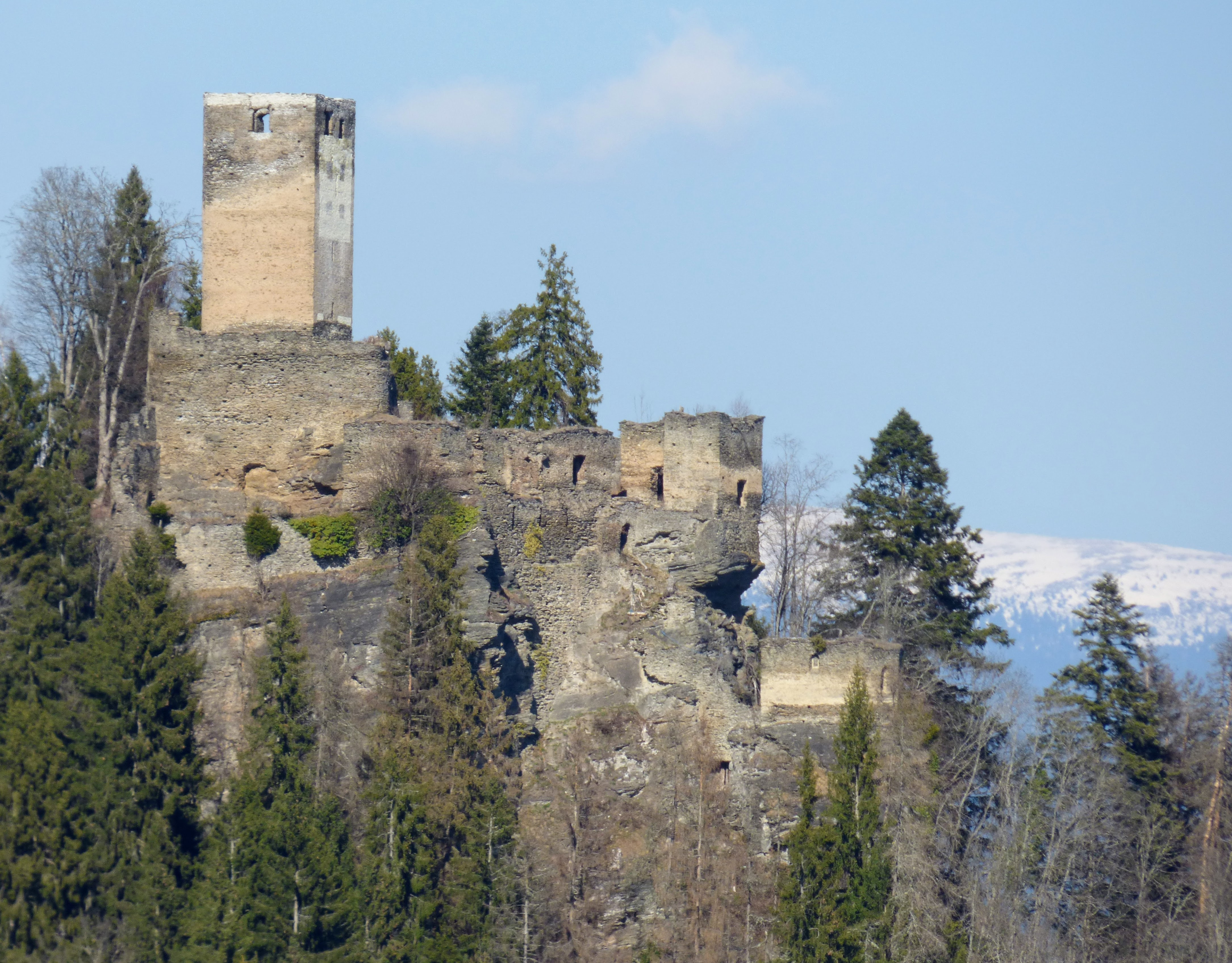 Hochkraig, Ansicht von Südwesten